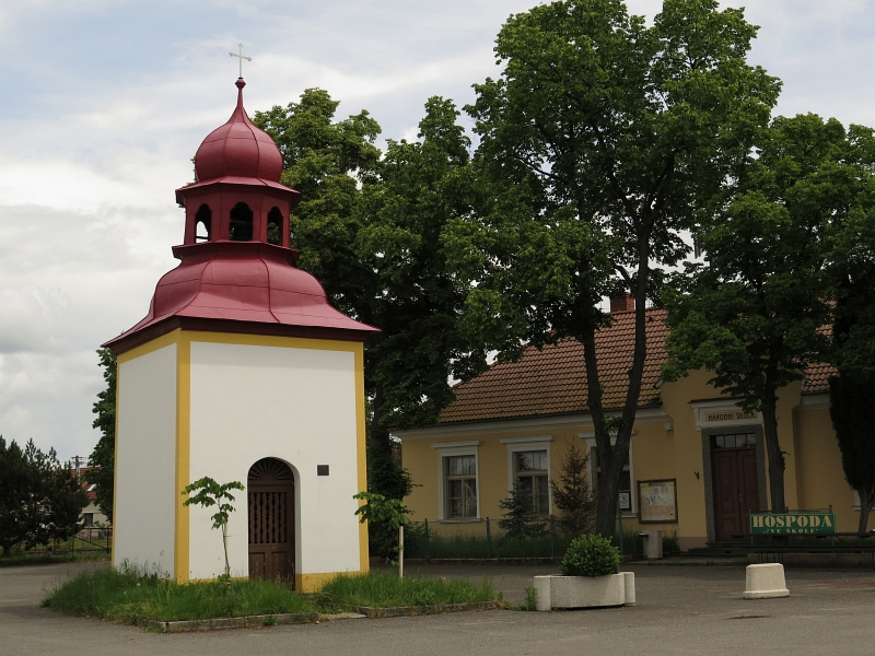 Kaplička Panny Marie, náves, Hvožďany (Bechyně).